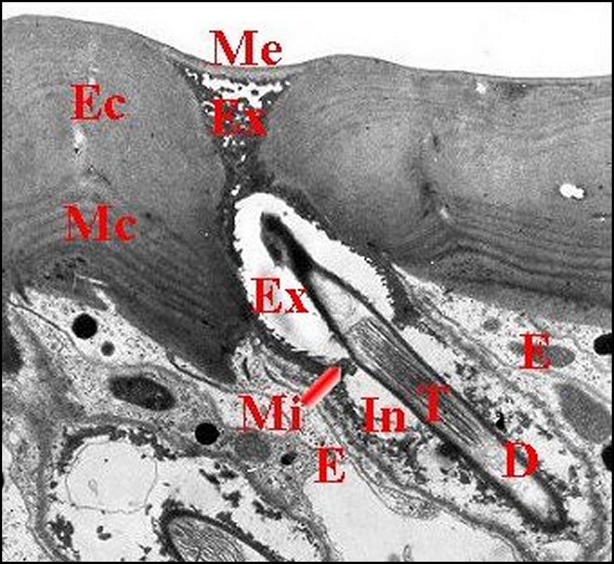 Ultrastructure de la cuticule au niveau des dendrites dans une lyrifissure d'organe sus-pédiculaire en bourrelet.Microscope électronique à transmission.